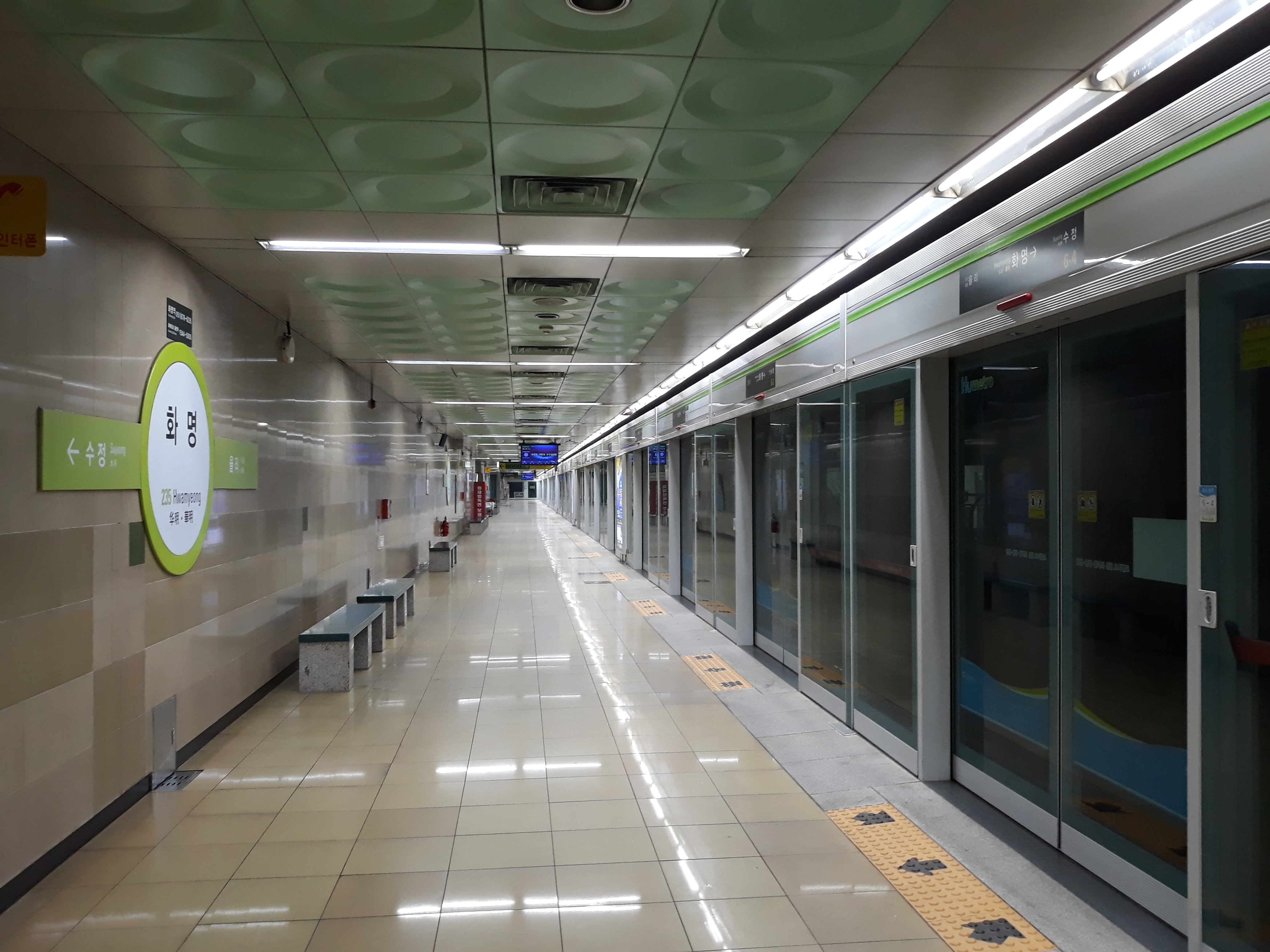 부산 도시철도 2호선 화명역 장산 방면 승강장